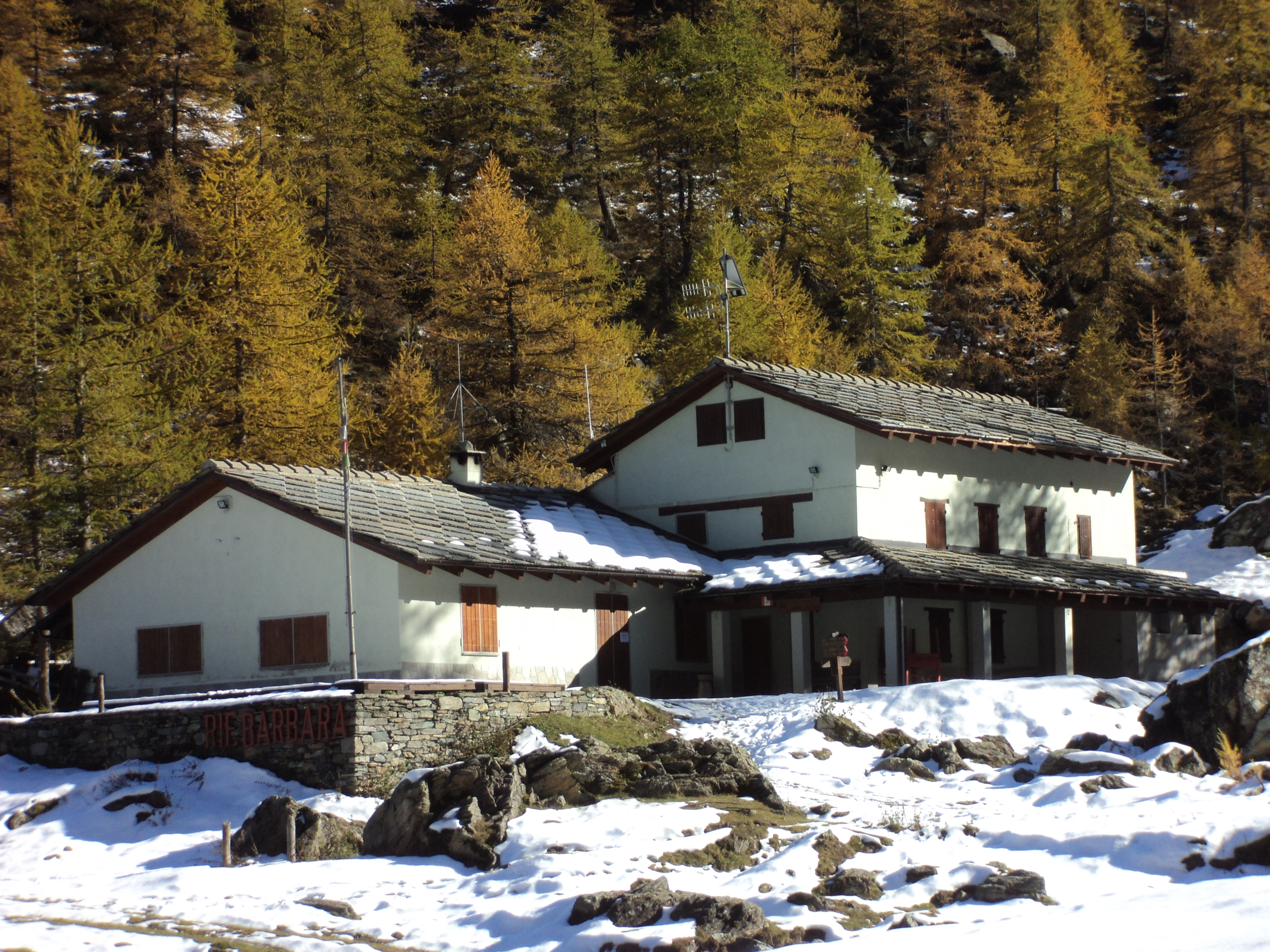 Il Rifugio Barbara Lowrie - Valle dei Carboneri - Val Pellice - Provincia di Torino